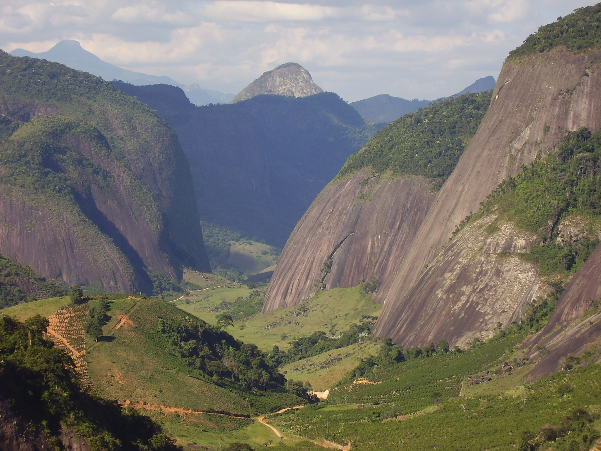 Estrela do Norte, com Forno Grande ao Fundo